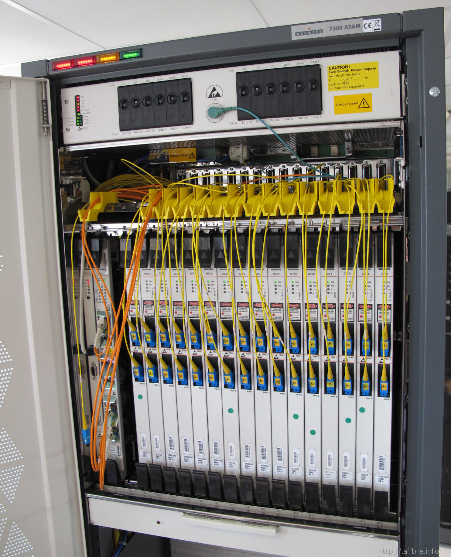 OLT Alcatel CityPlay Amiens